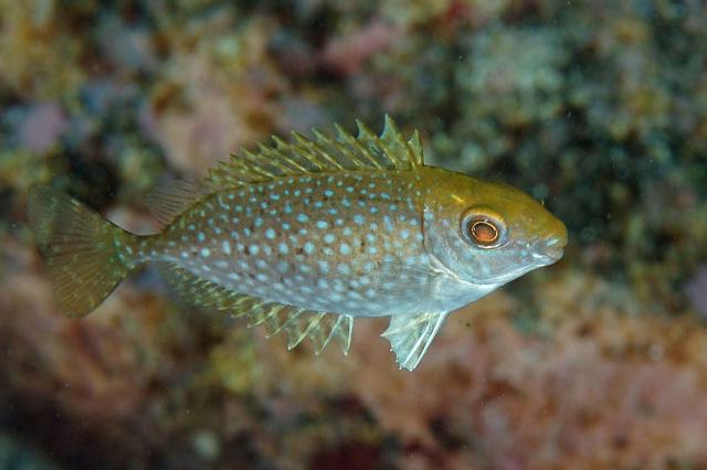 Siganus fuscescens juvenil en la península de Izu, Japón